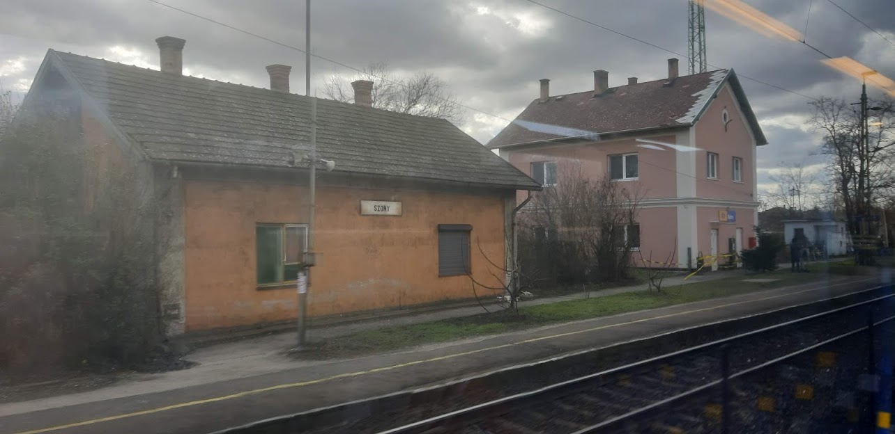 Szőny megállóhely